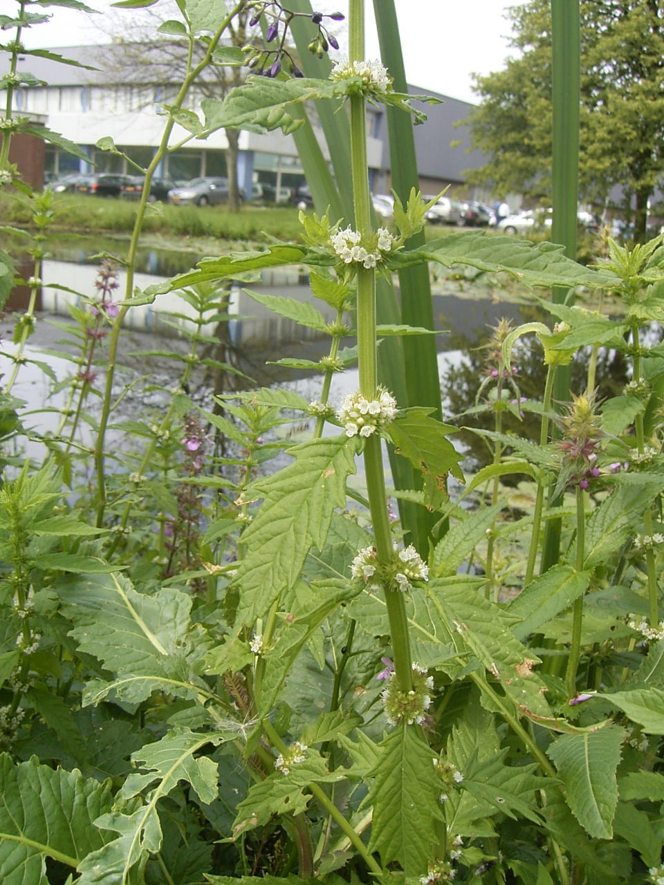 Deze foto toont de stengel en bladeren van de Wolfspoot. Ik nam de foto op 29 juli 2005 op bedrijventerrein Goudse poort in Gouda, Nederland. This photo shows the leaves of Lycopus europaeus. I took this pic on July 29, 2005 in Gouda, Netherlands.